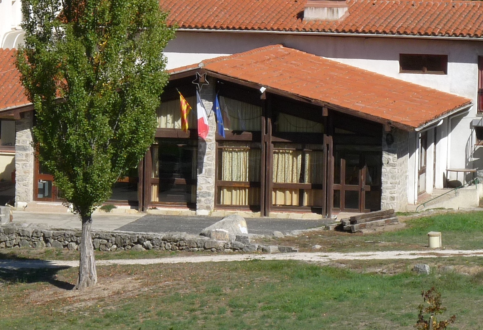 Nouvelle mairie de Fuilla , Pyrénées-Orientales, France